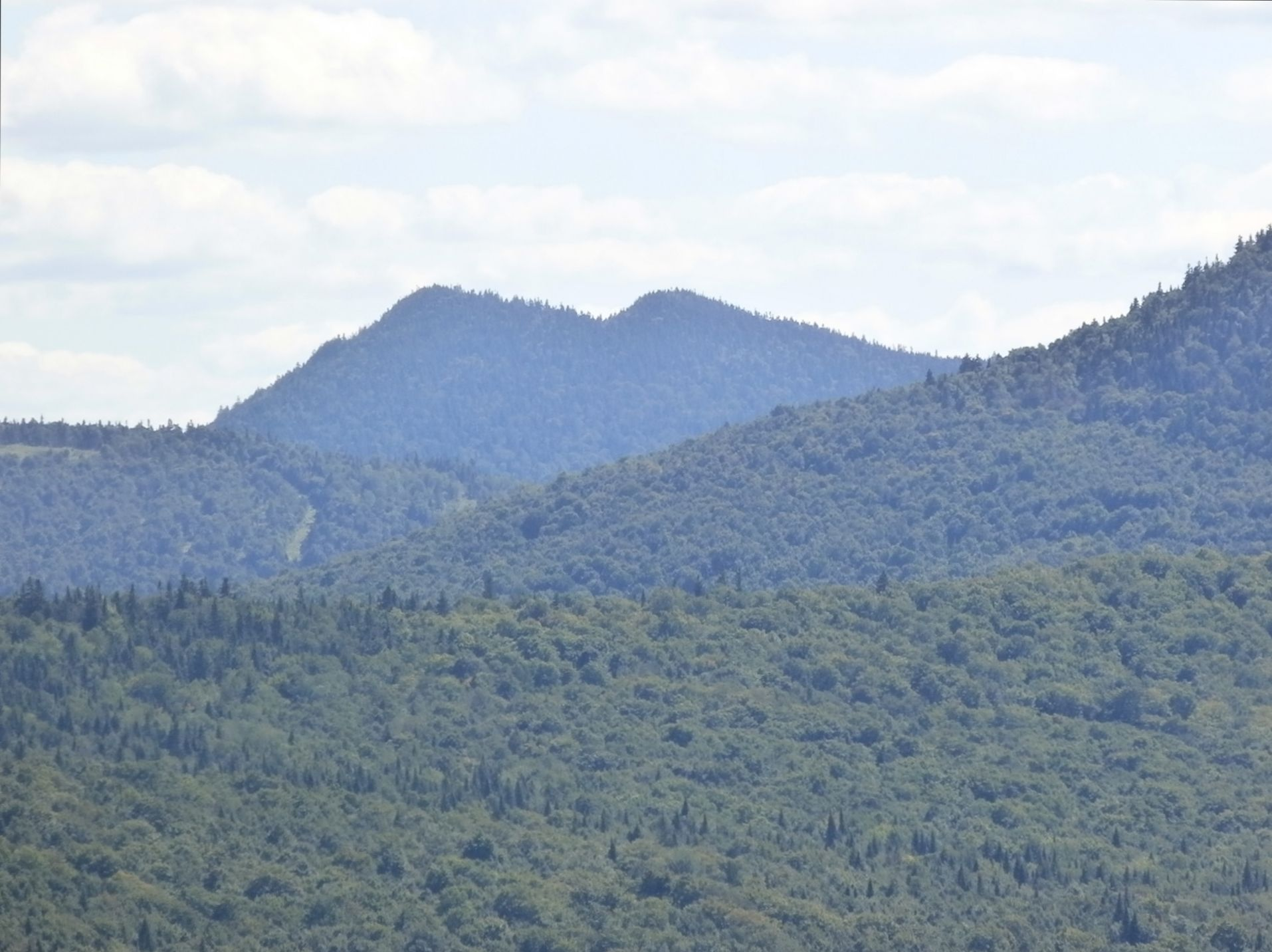 Versant nord du mont Twin Peaks près de la frontière. La ligne déboisée entre le Québec et les USA est visible à gauche